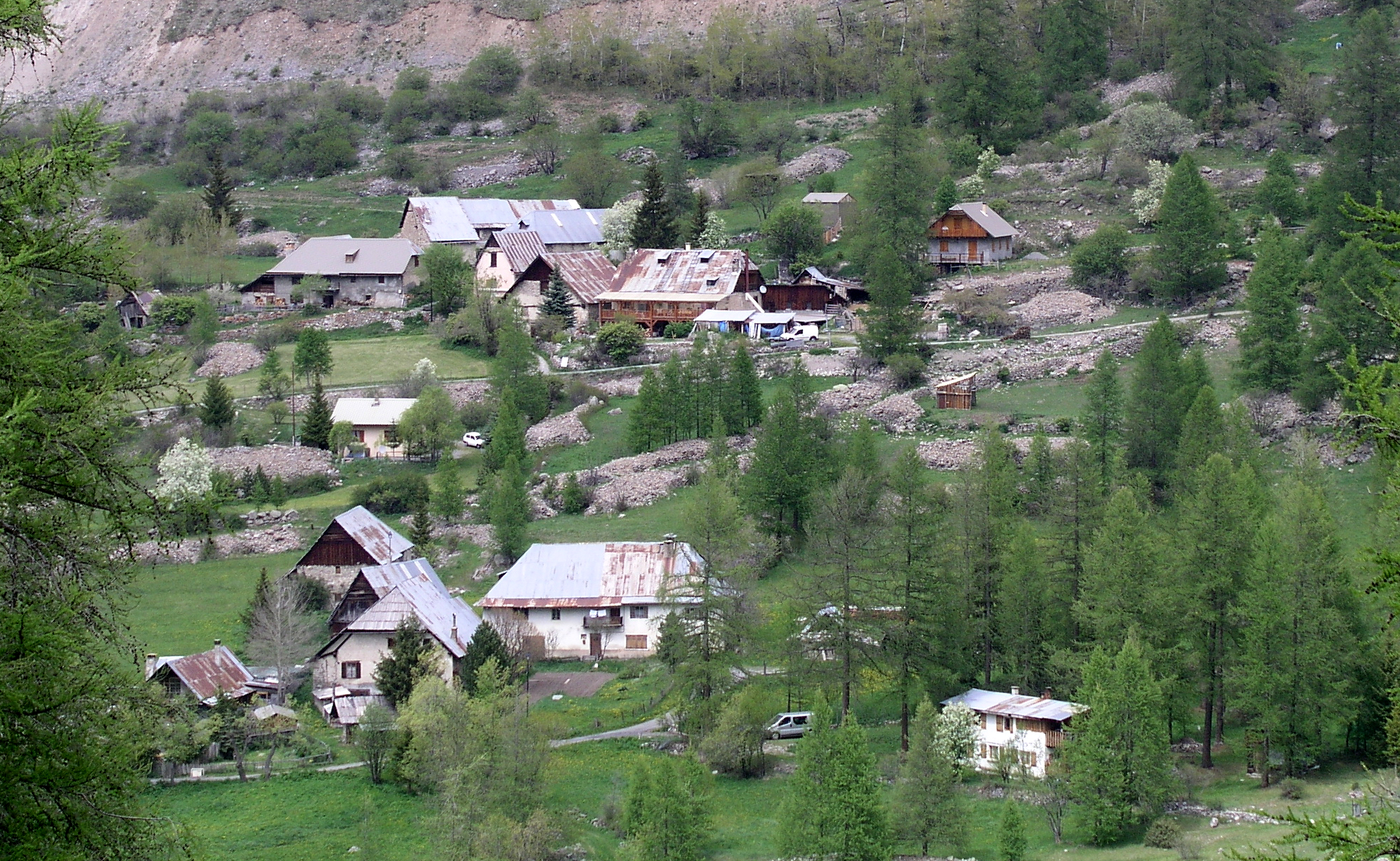 Le village de Bayasse (Uvernet-Fours).